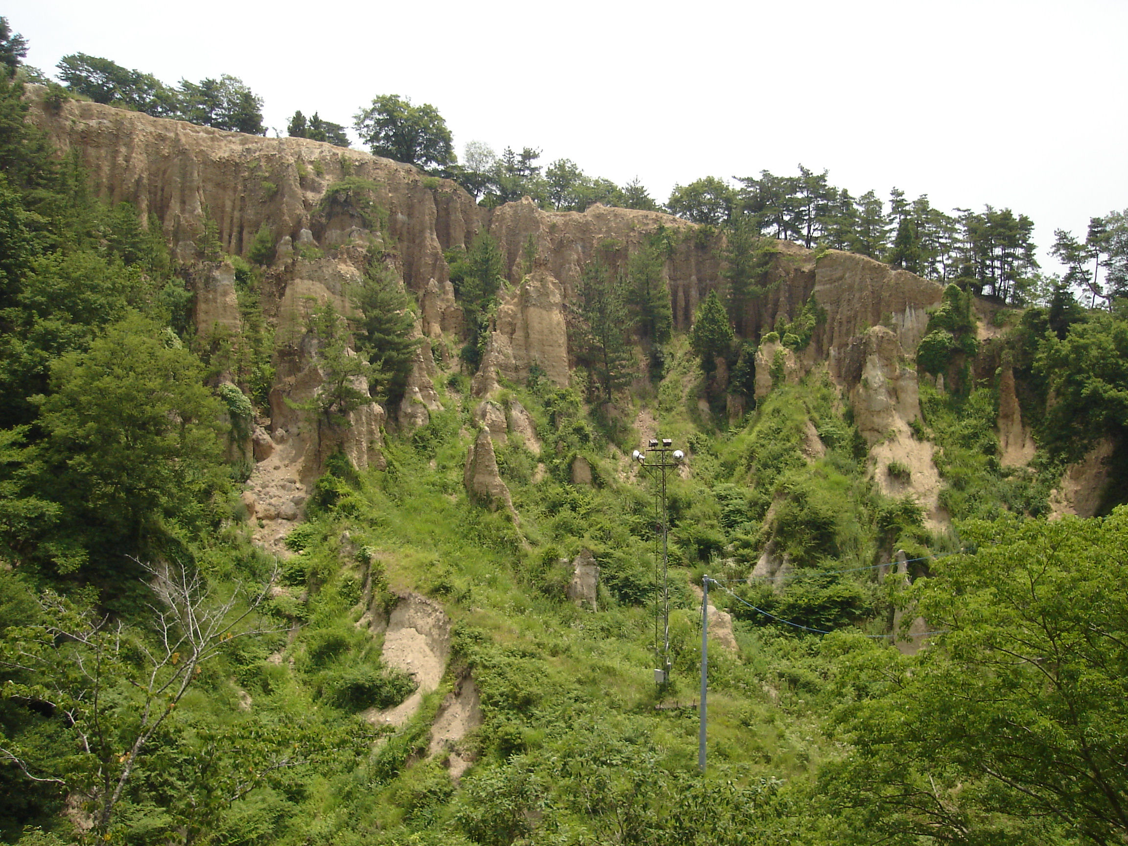 投稿者撮影2005/06/24 土柱 Awa no Dochū, Awa, Tokushima, Japan